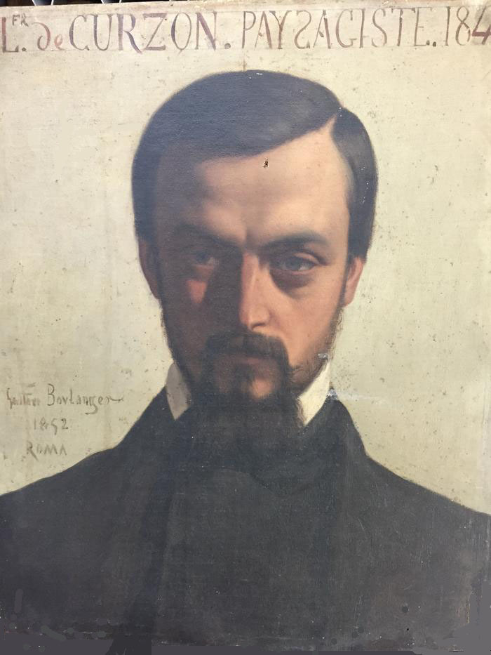 Alfred de Curzon (1820-1895)